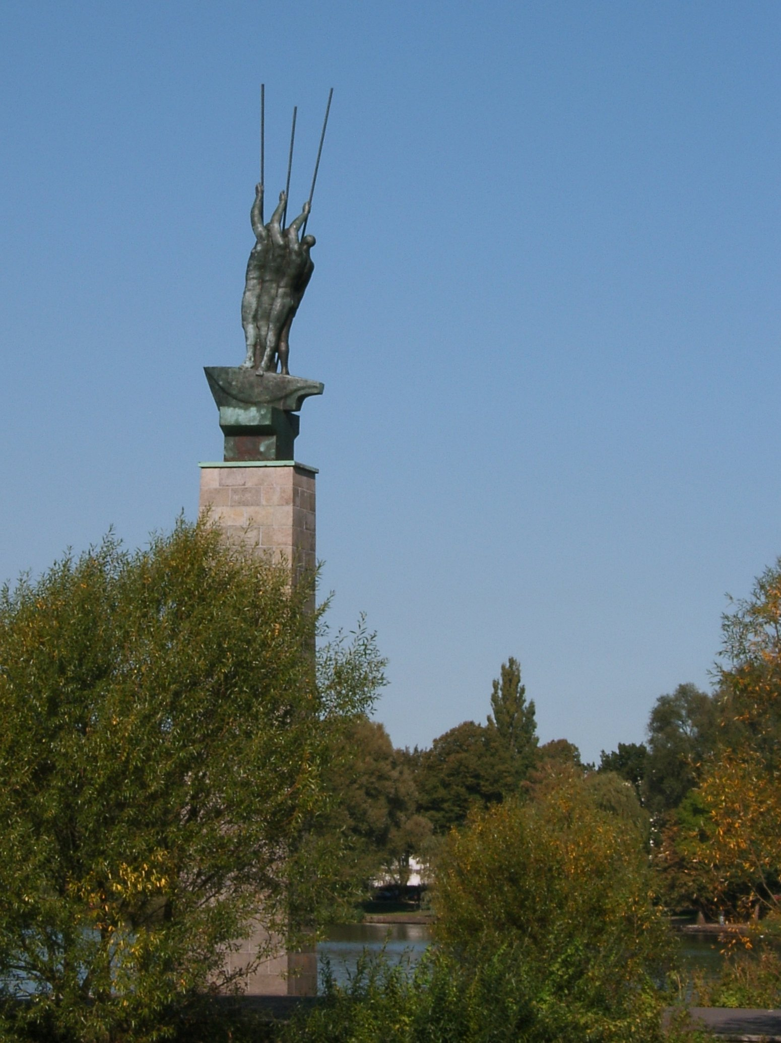 Bildbeschreibung: Hamburg, Aussenalster, Drei Männer im Boot by Edwin Scharff Fotograf: eigene Aufnahme Datum: 2004